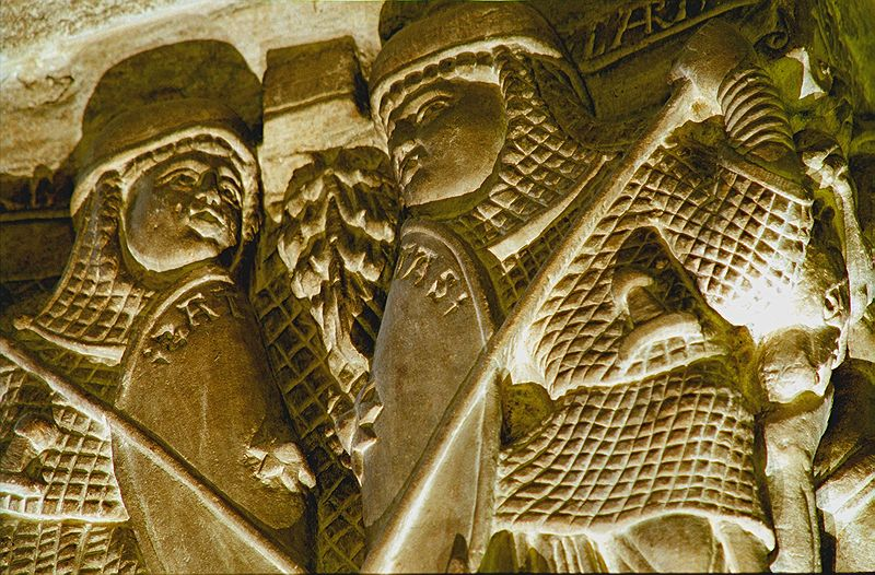 Chapîteau de Notre-Dame du Port cCapitals of Notre-Dame du Port